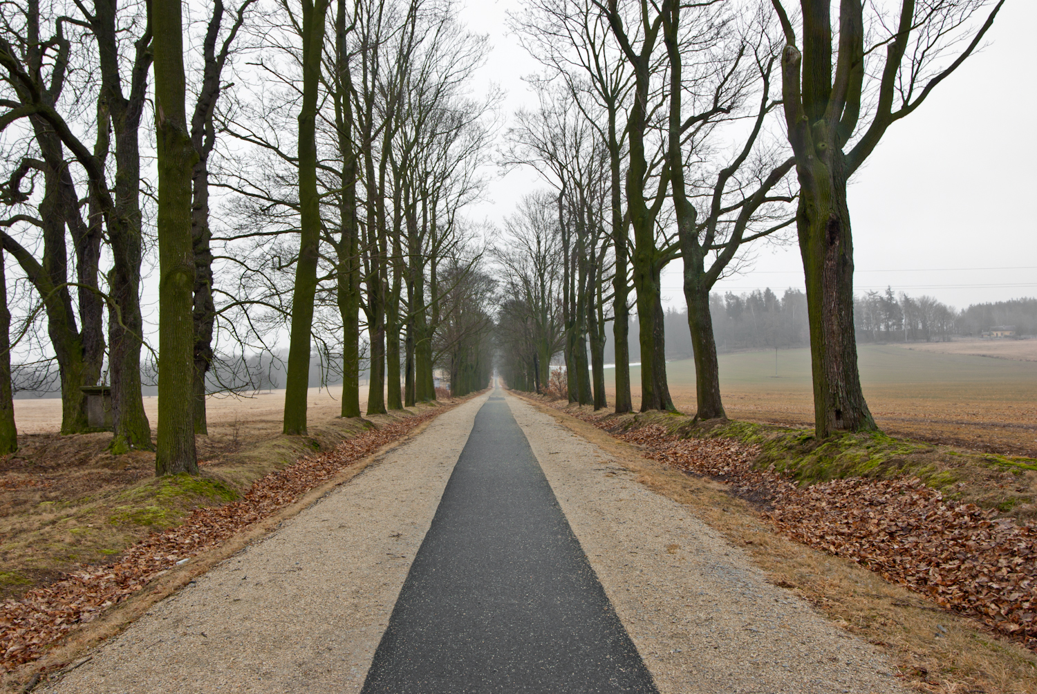 Mostov, okres Cheb, památné stromy, alej - javor mléč